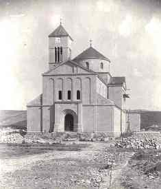 Stjepan Podhorsky- bazilika sv. Ćirila i sv. Metoda na Duvanjskom polju